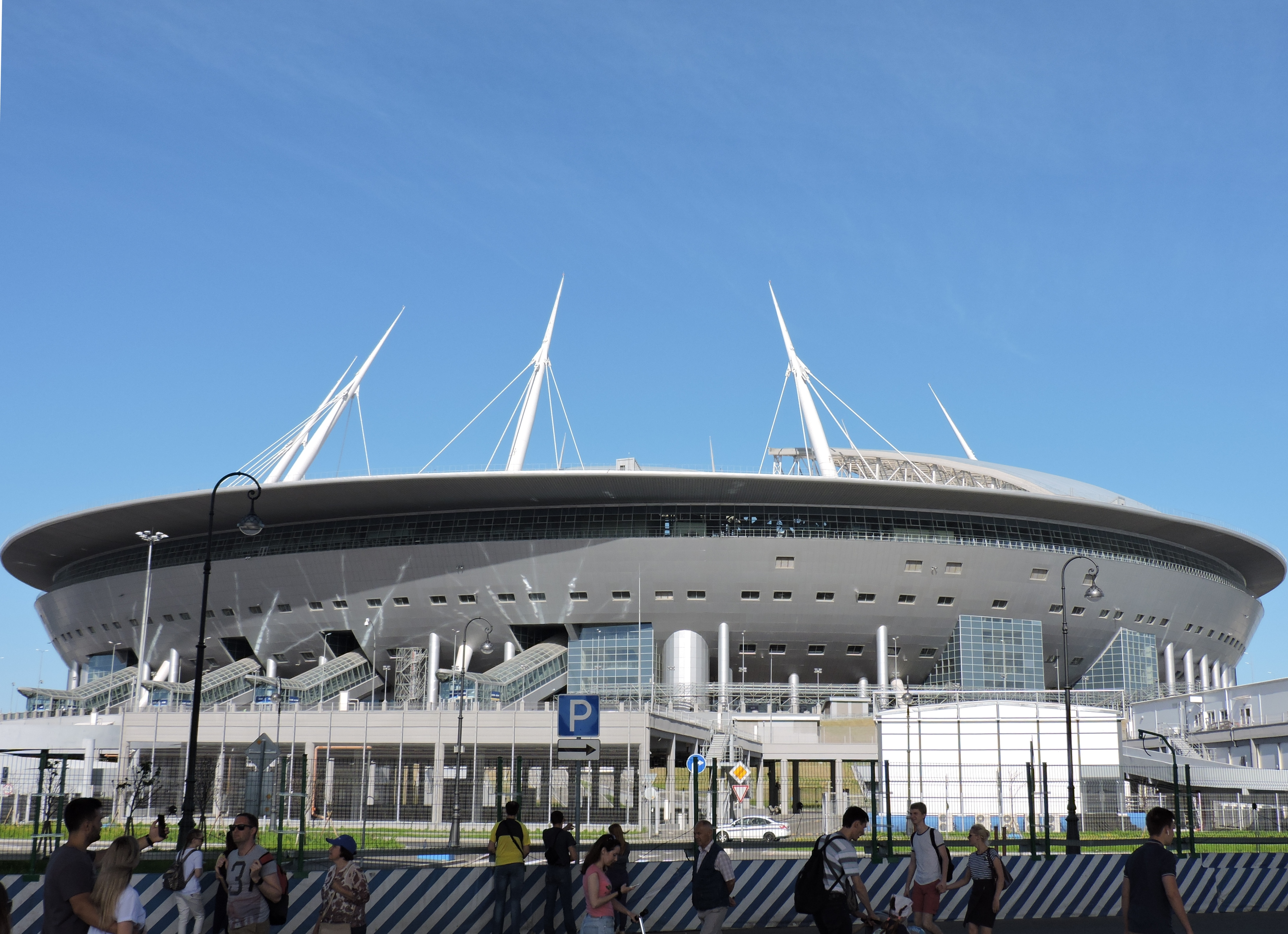 Стадион "Санкт-Петербург"